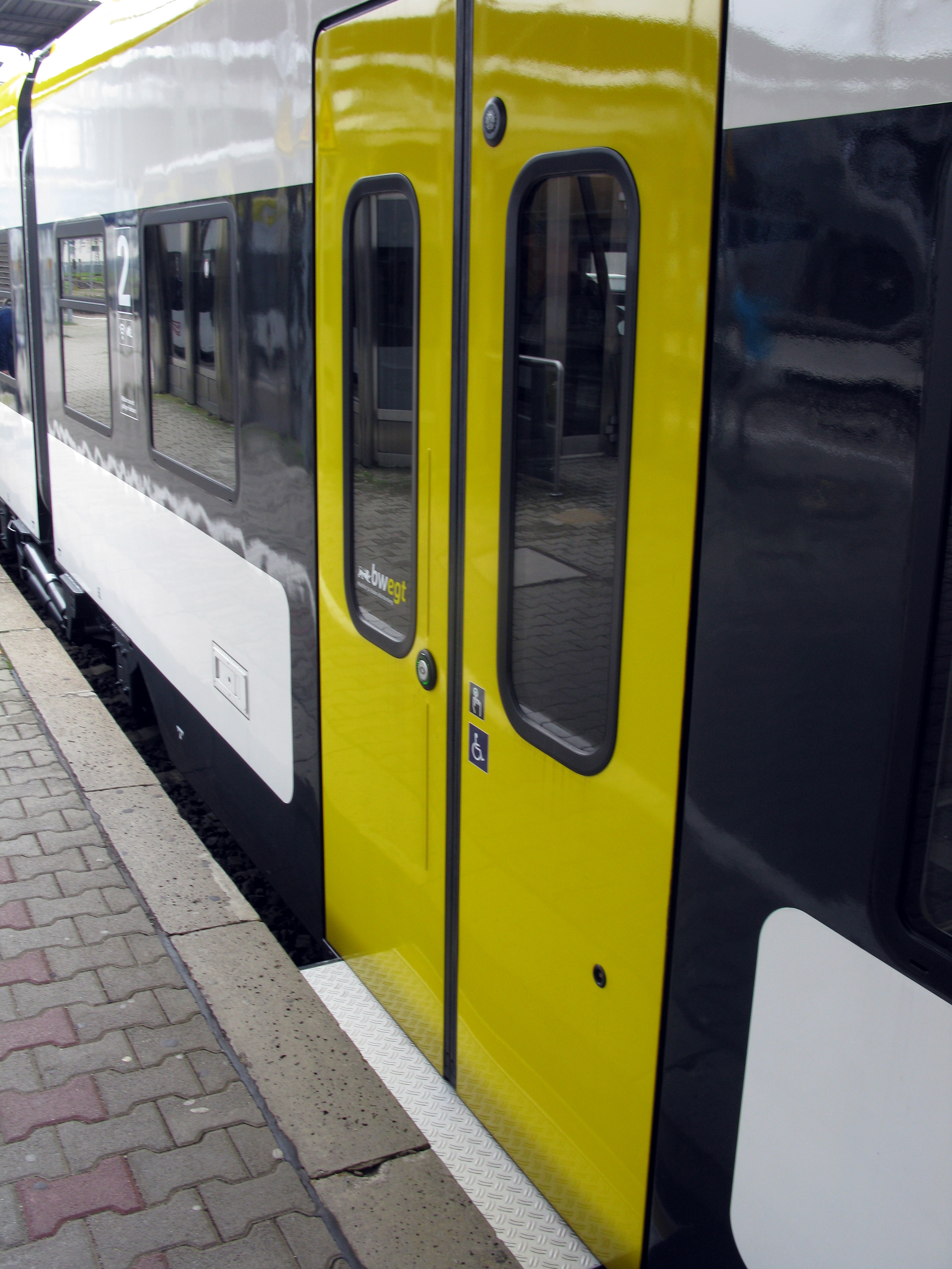 Alstom Coradia Continental in den baden-württembergischen Landesfarben auf der Höllentalbahn im Hauptbahnhof Freiburg im Probebetrieb, Tür mit ausfahrbarer Trittstufe